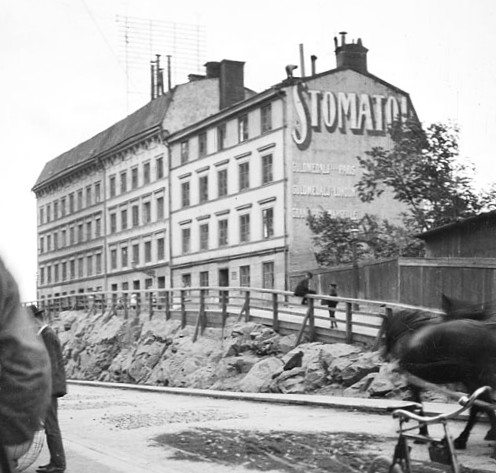 Regeringsgatan 92-94. Reklam för Stomatol på brandgaveln